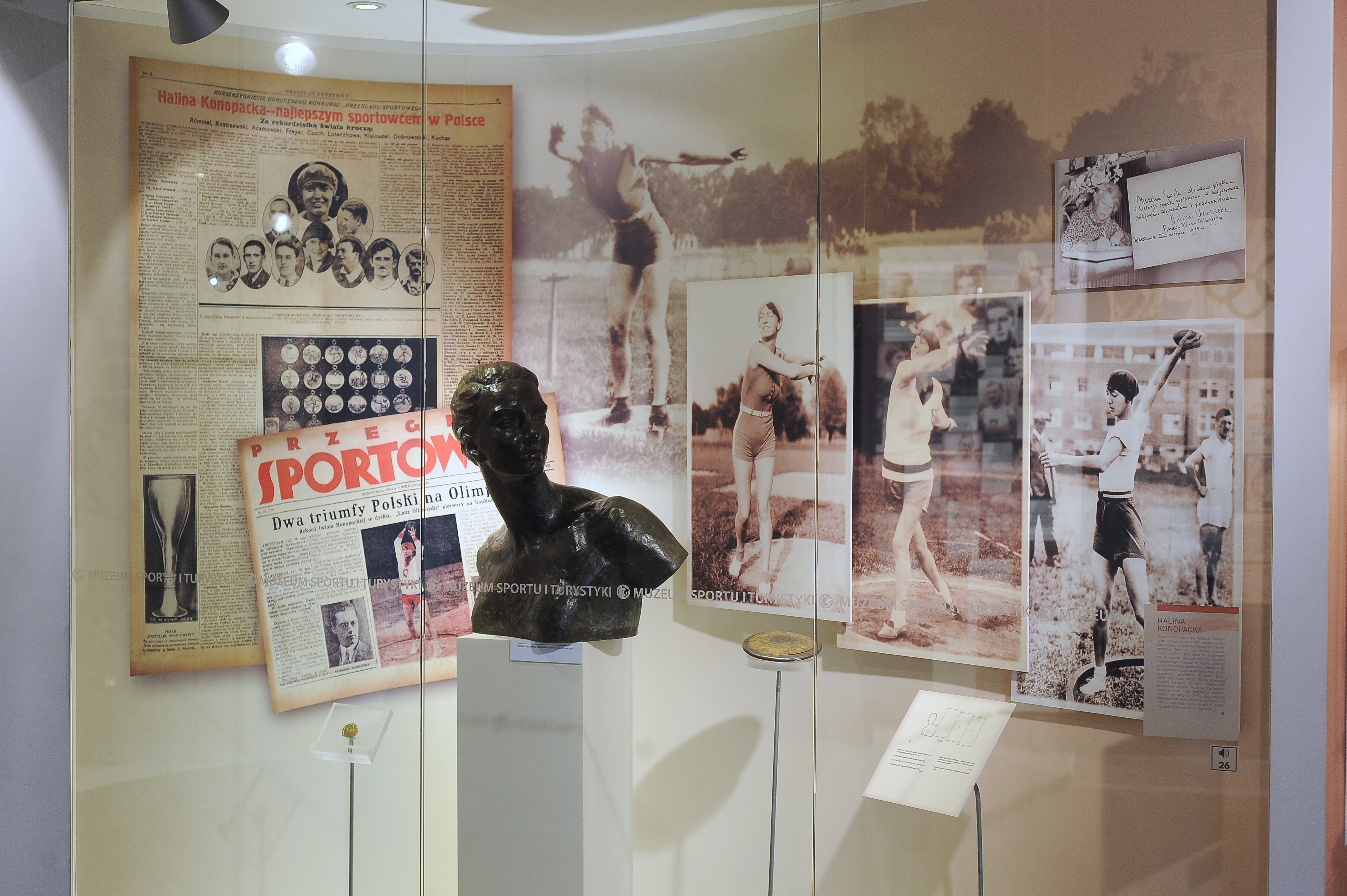 Gablota poświęcona sylwetce Haliny Konopackiej w Muzeum Sportu i Turystyki w Warszawie